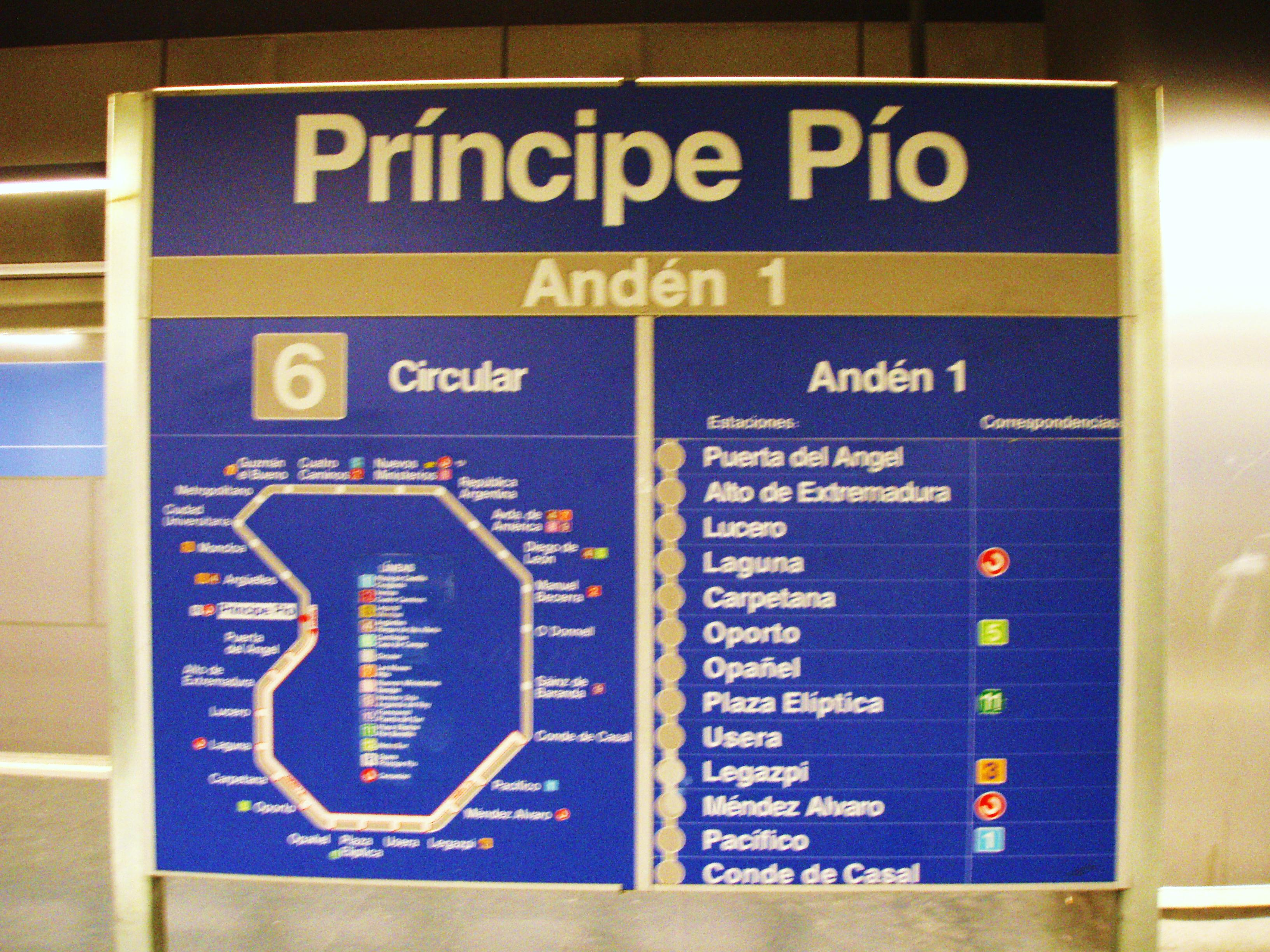 Panel de información en la estación madrileña de Príncipe Pío.